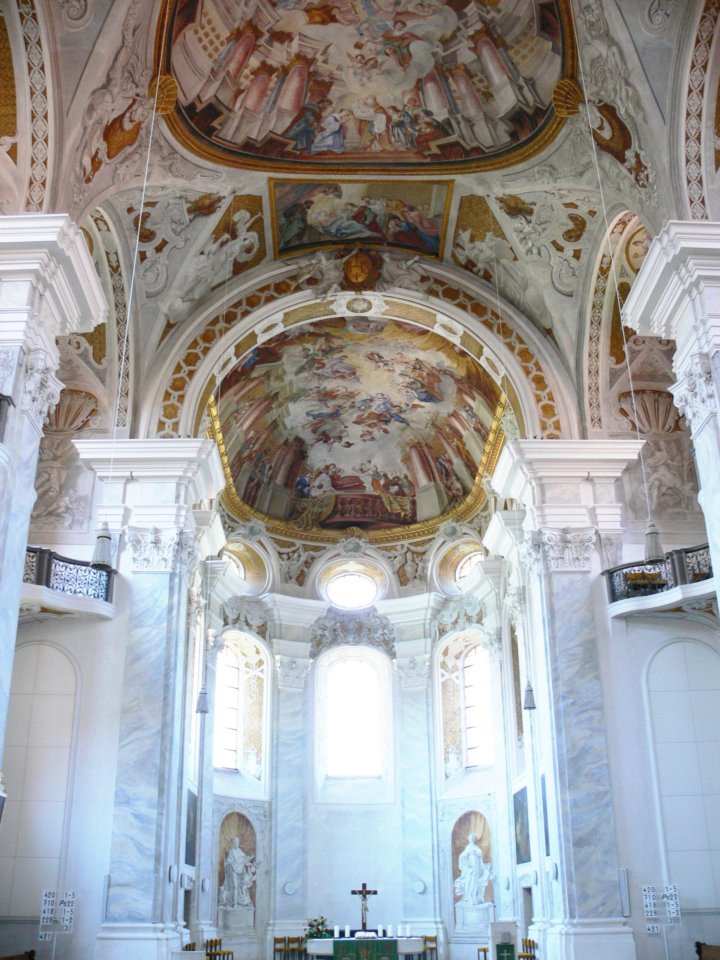 Evangelische Stadtkirche (ehem. Jesuitenkirche), Ellwangen (Jagst)